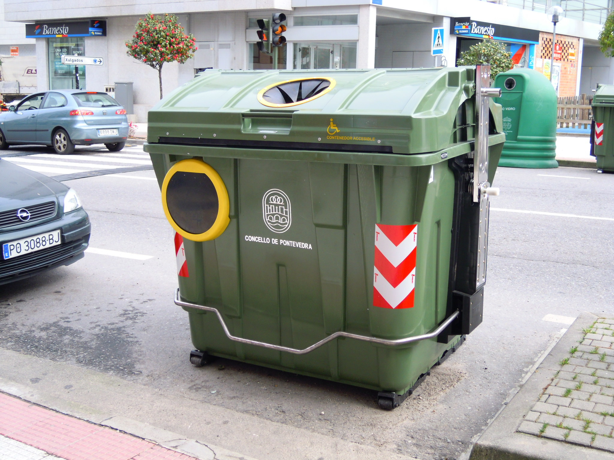 Contedor do lixo adaptado para persoas con minusvalía física, na rúa Eduardo Pondal de Pontevedra